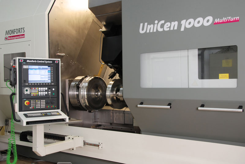 Токарно-фрезерный центр Monforts UniCen 1000 MultiTurn